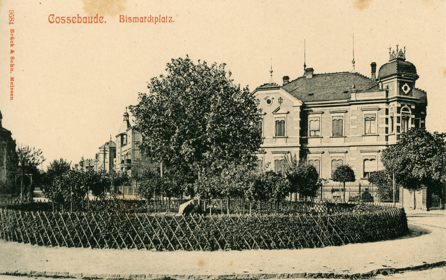 Cossebaude; Bismarckplatz This postcard is from publisher Brück & Sohn in Meißen ( postcard has a unique number 09584 and is available in a higher resolution at the publisher. This images was uploaded in a cooperation project between Wikipedians and the publisher.